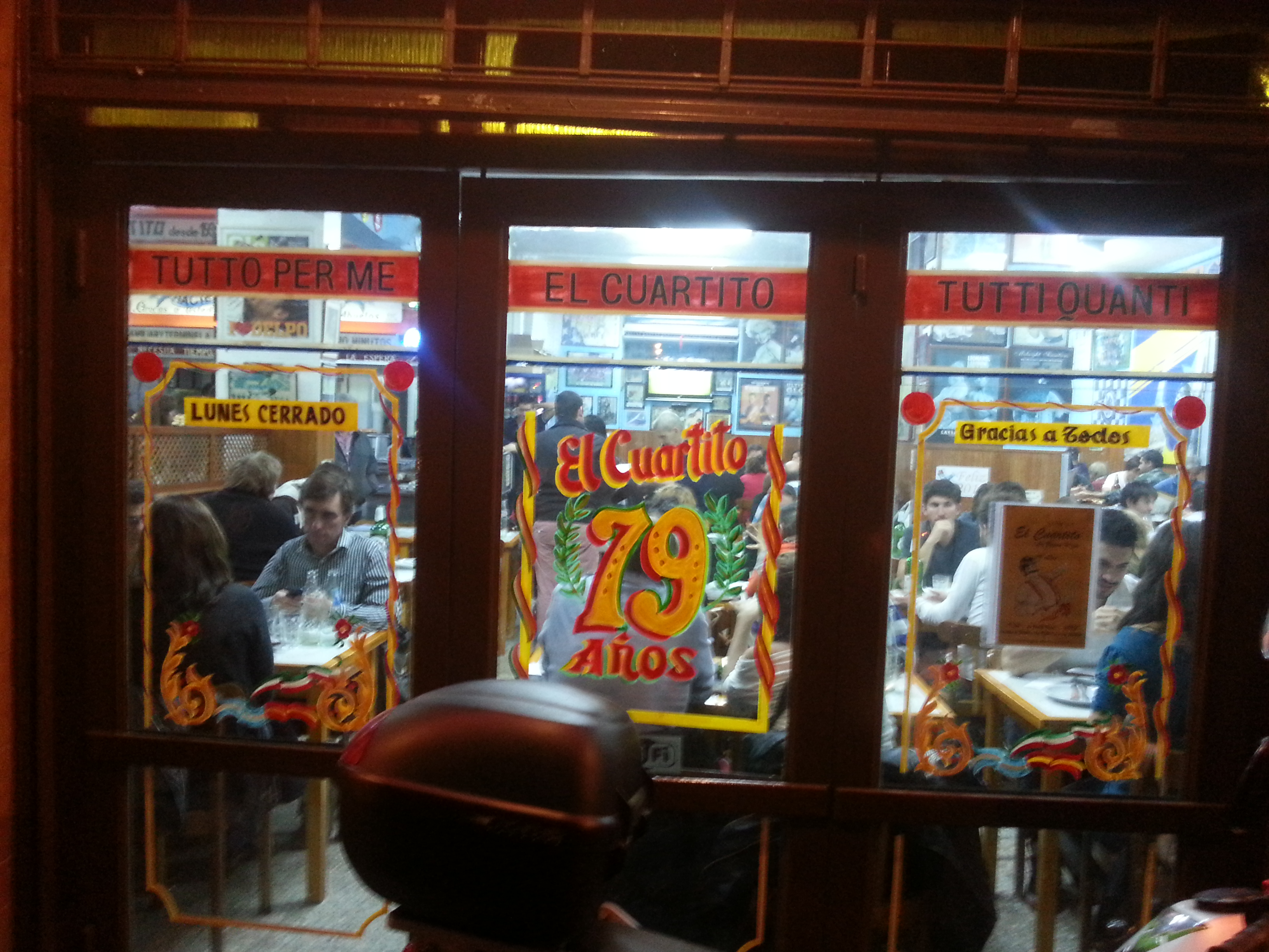 Pizzería "El Cuartito"